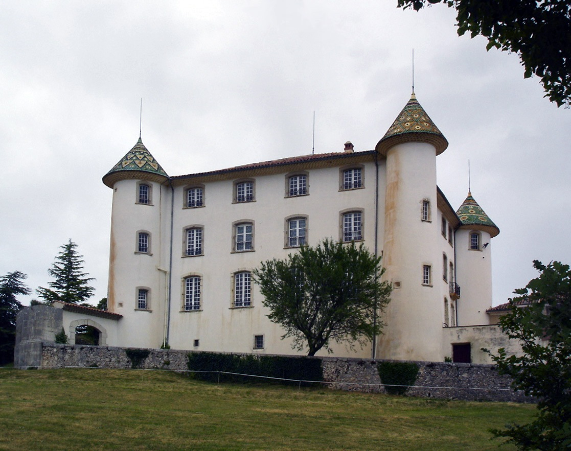 Château d'Aiguines communs, jardin, tour